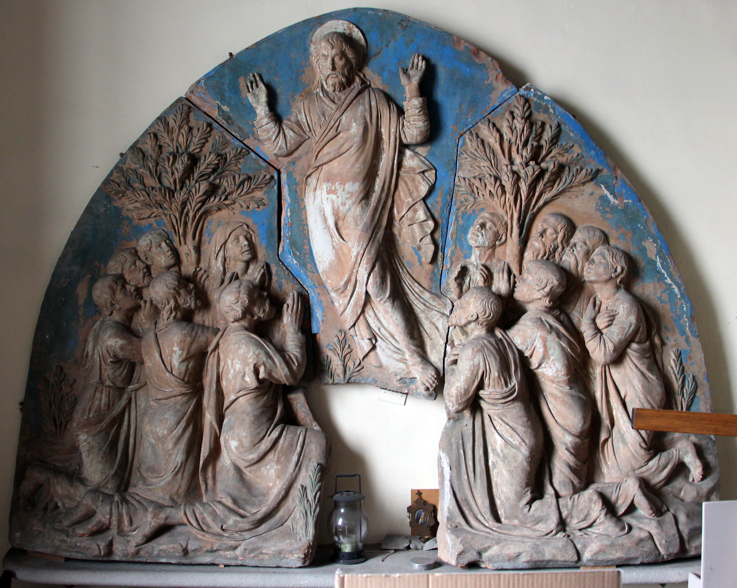 San Bartolomeo a Ripoli